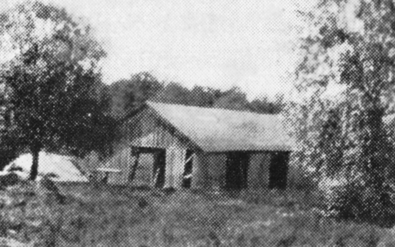 Smista lada 1920-tal på platsen för Smista mangårdsbyggnad